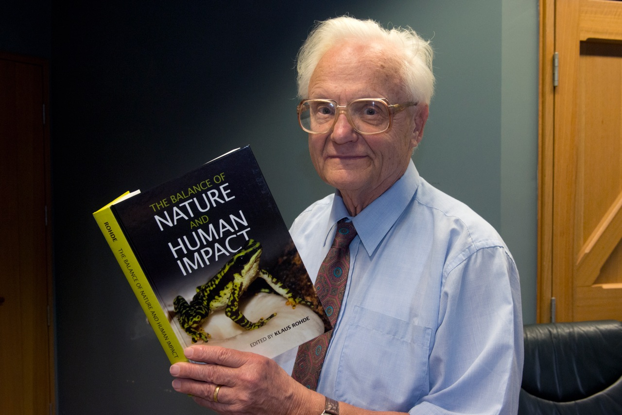 Klaus Rohde 2013 mit seinem Buch The Balance of Nature and Human Impact.